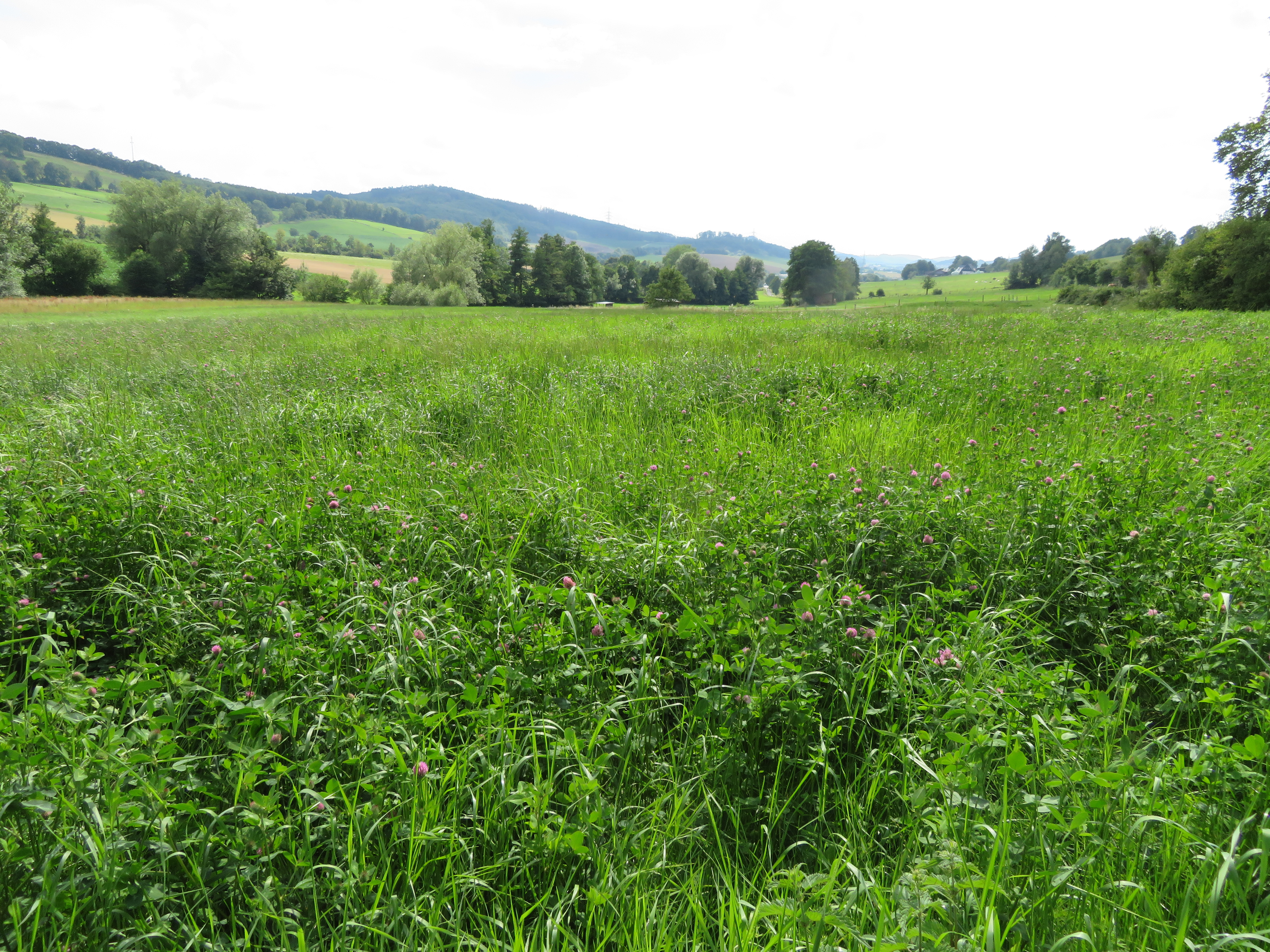 Landschaftsschutzgebiet Talraum der Milmke vom Ostrand.